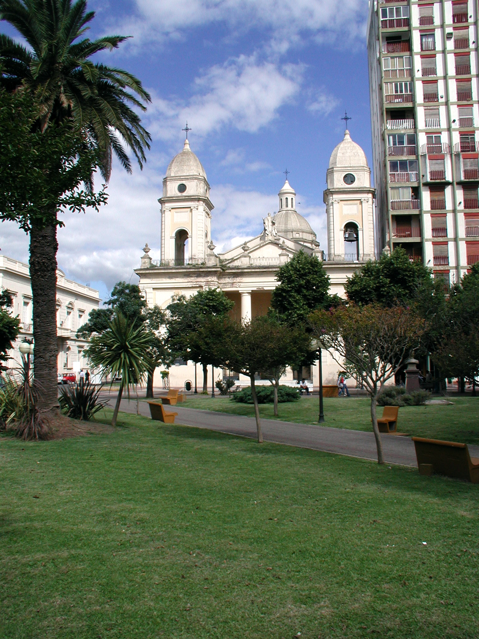 San Nicolas - Plaza Mitre (main square)